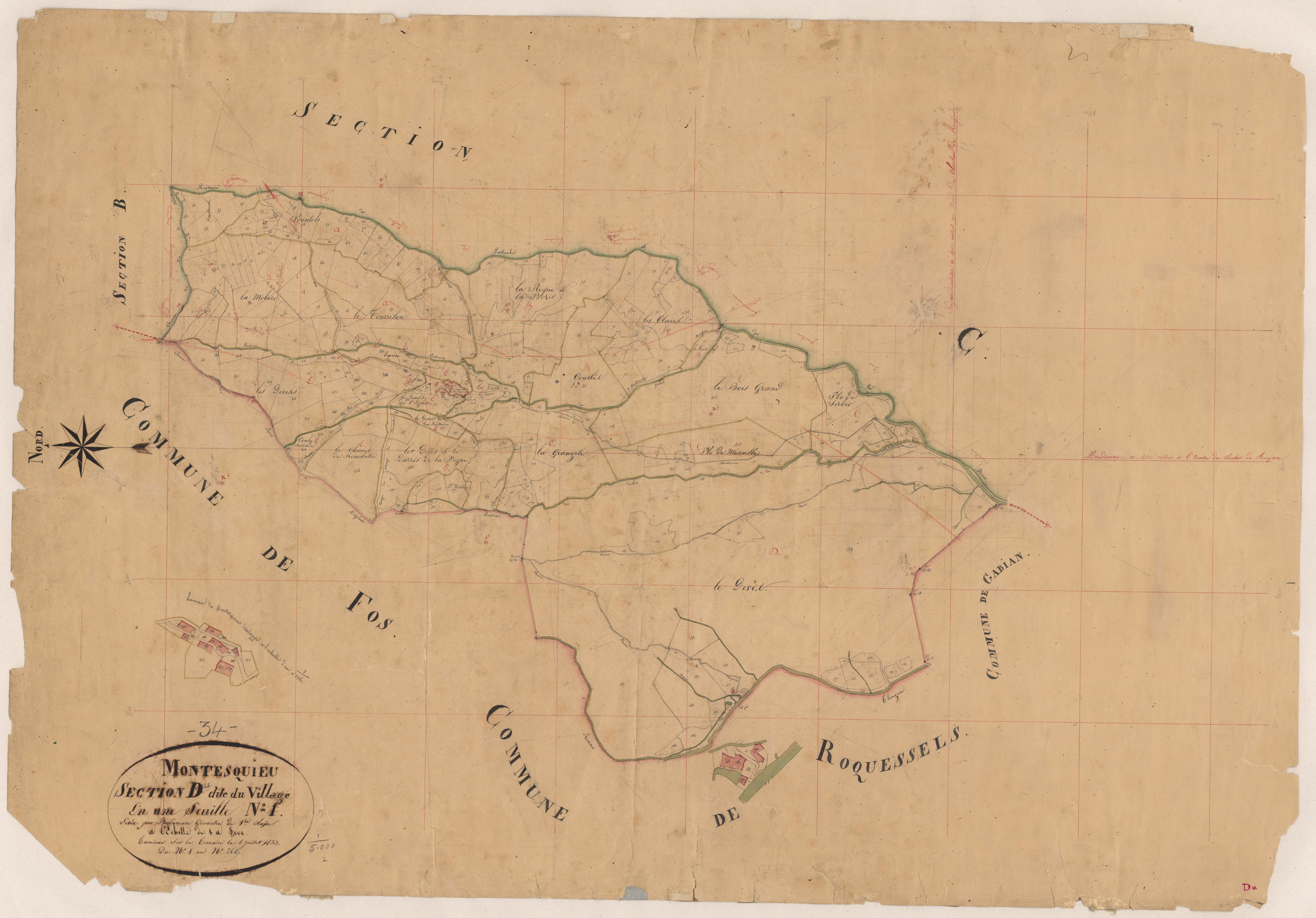 Montesquieu. - Cadastre napoléonien : plan de la section D du Village